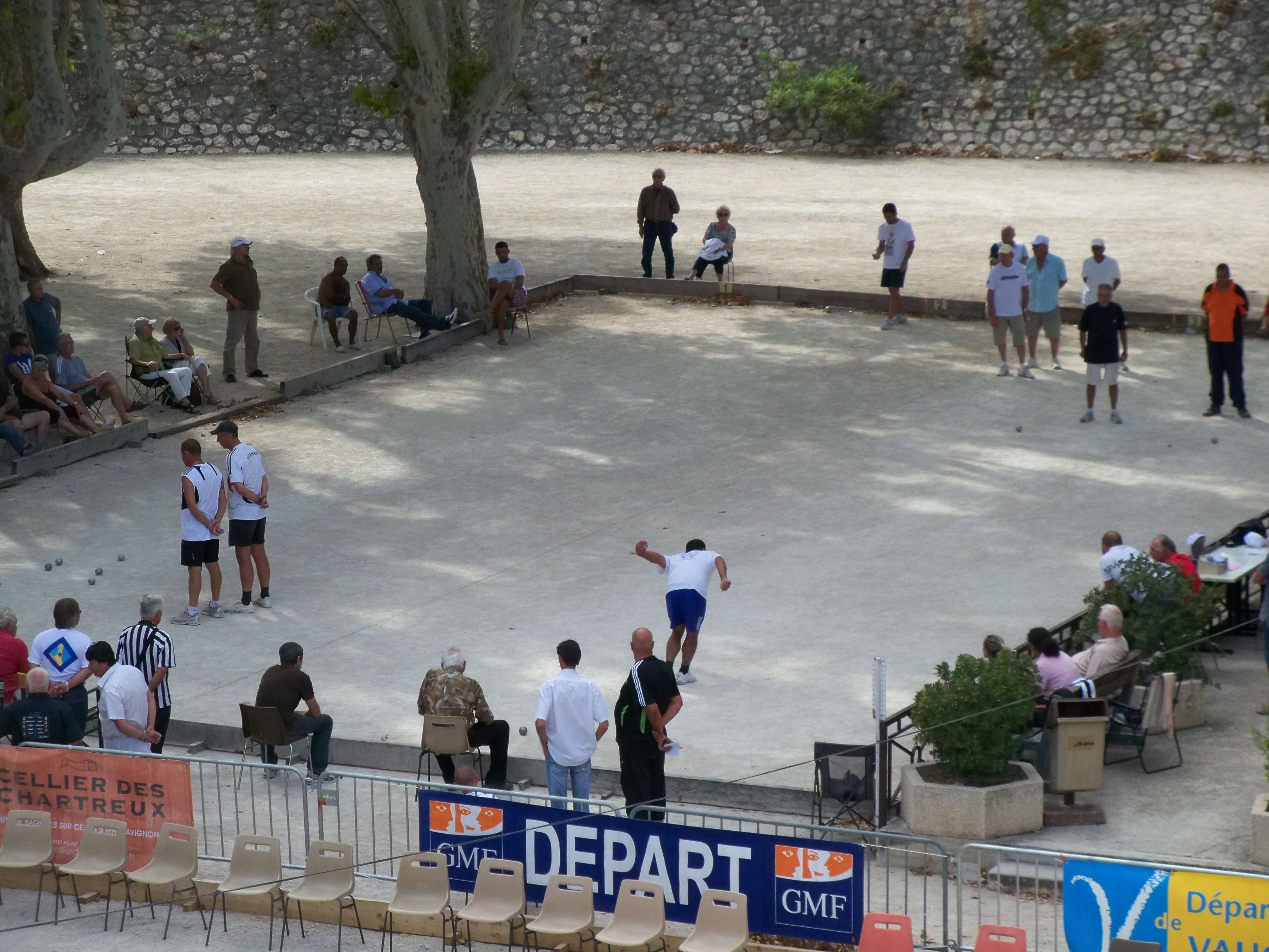 Pétanque à Avignon (84)